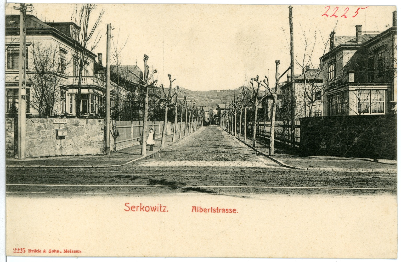 Serkowitz; Albertstraße This postcard is from publisher Brück & Sohn in Meißen ( postcard has a unique number 02225 and is available in a higher resolution at the publisher. This images was uploaded in a cooperation project between Wikipedians and the publisher.